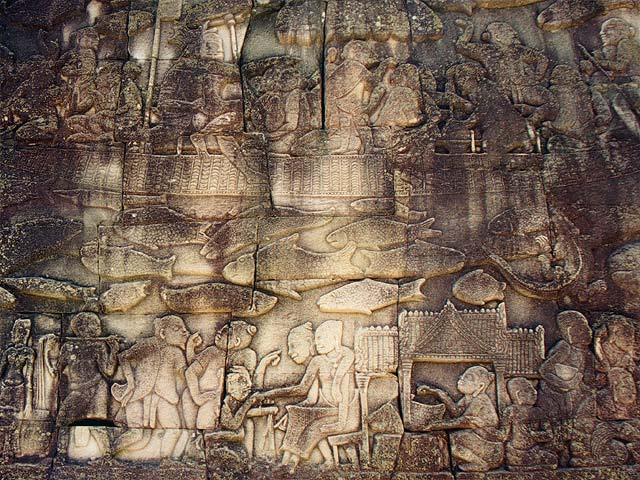 Darstellung des Alltagslebens der Khmer im historischen Angkor. Im oberen Drittel chinesische Soldaten, im mittleren Drittel Fische welche den Tonle Sap See (durch Fischreichtum und Bewässerung der Reisfelder eine die wichtigste Quelle für Nahrungsmittel) symbolisieren. Das untere Drittel eine Marktszene: rechts eine Küche, in der Mitte Marktfrauen beim Wiegen von Gütern und links zwei chinesische Männer im Gespräch. Relief an der äußeren Galerie des Bayon (Südflügel), spätes 12. bis erstes Viertel de:13. Jahrhundert siehe auch: Angkor Thom, Angkor, Kambodscha